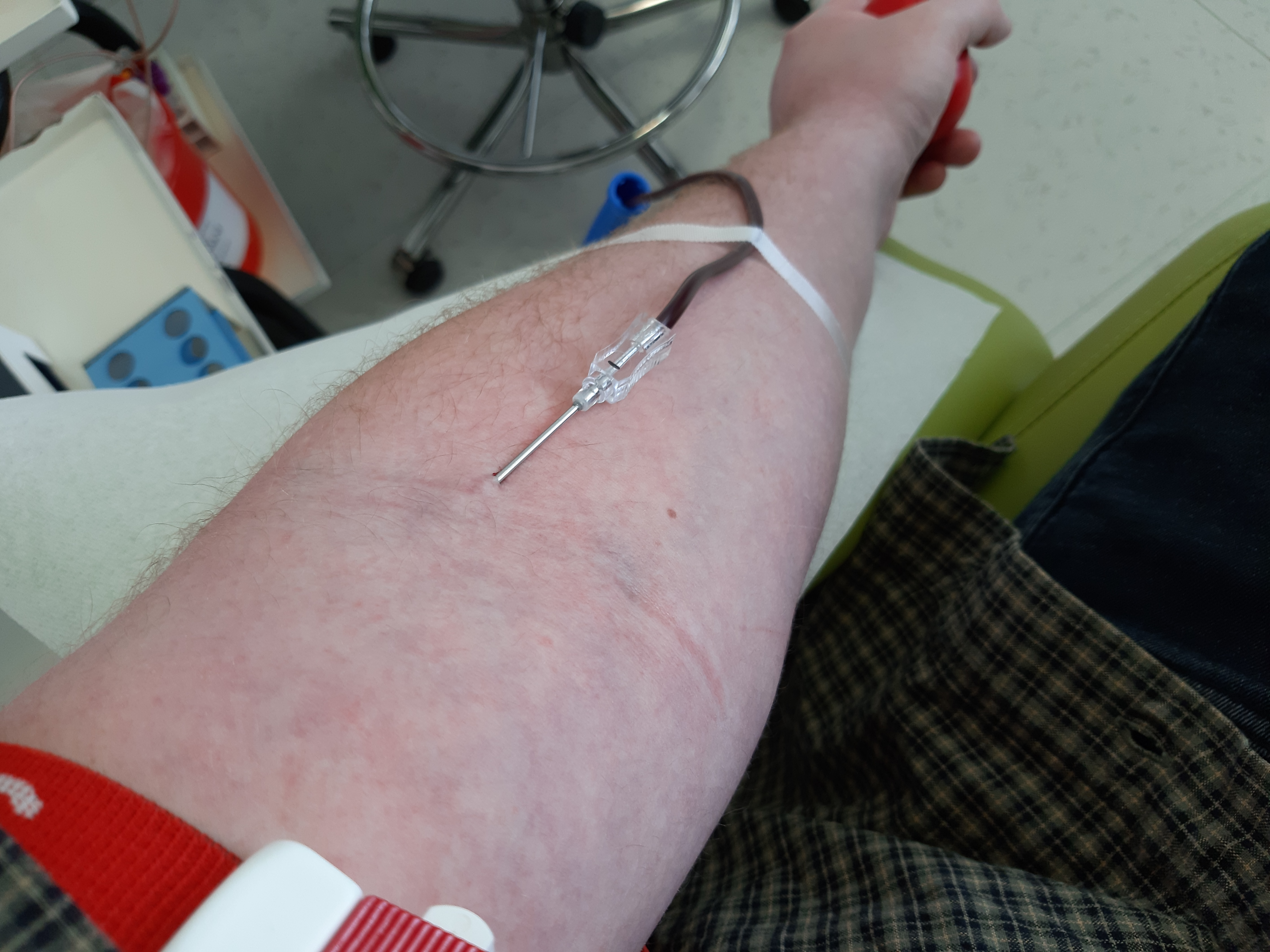 Přesto ale odběr probíhal úspěšně. → Transfúzní a tkáňové oddělení muselo přejít na papírový režim. → Brněnská Nemocnice Bohunice byla 13. března 2020 ochromena kyberútokem. Vzhledem k faktu, že se tato nemocnice podílí na testování vzorků krve odebrané lidem s podezřením na k-vir, a vzhledem k vyhlášenému stavu nouze na území ČR hrozí pachateli (či pachatelům) až výjimečný trest.